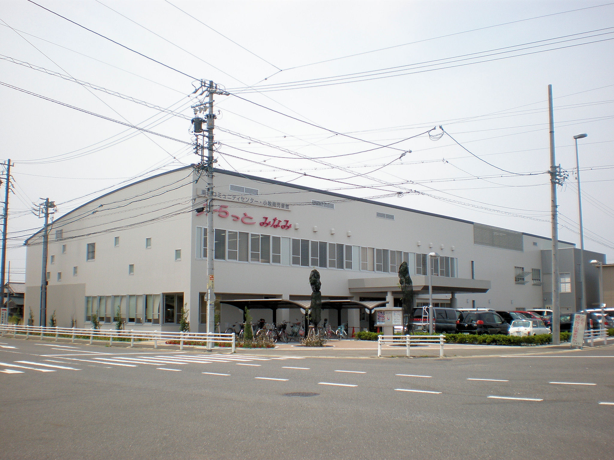 愛知県小牧市にあるふらっとみなみ（小牧市南部コミュニティセンター・小牧南児童館）